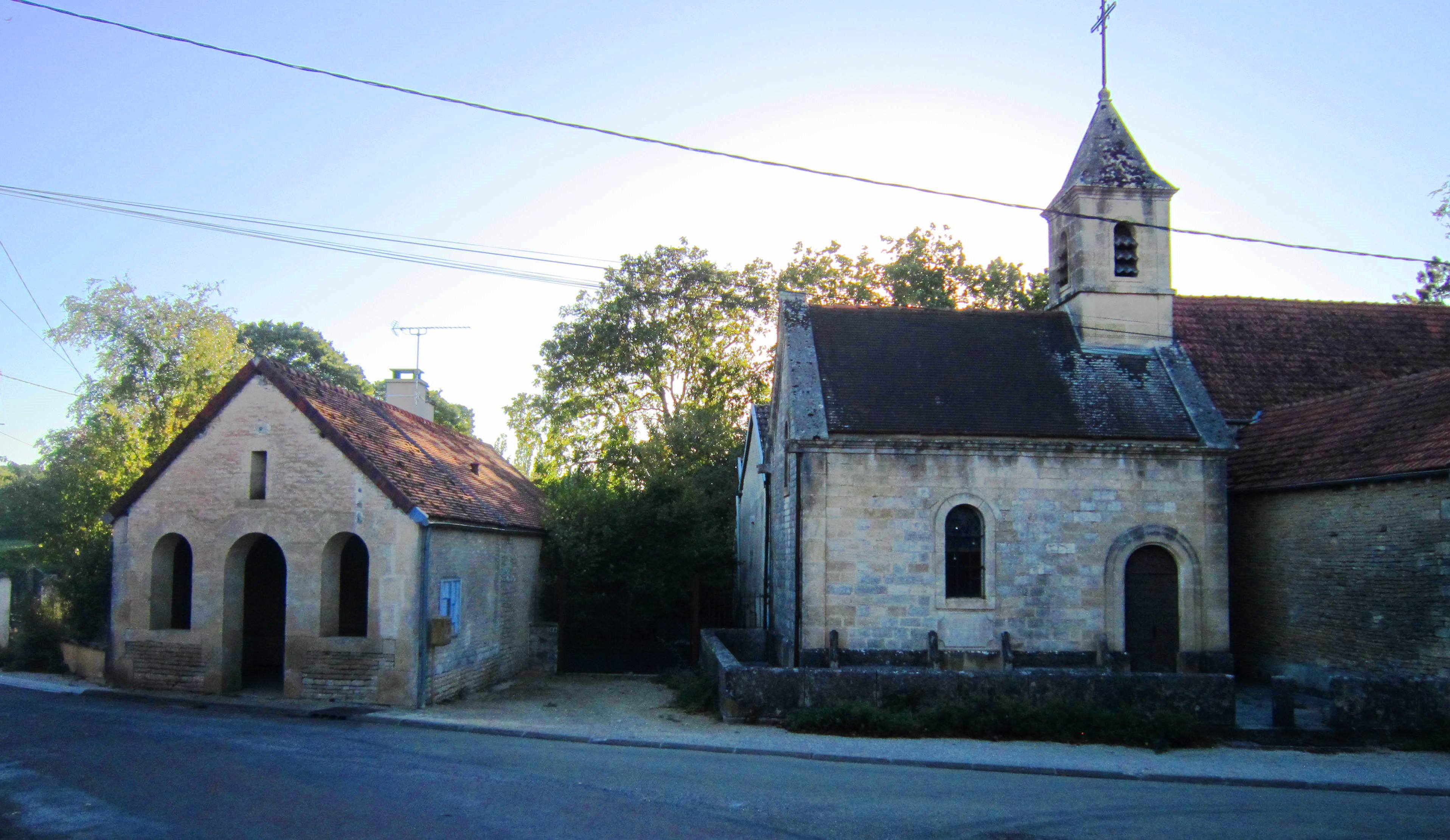 Massoult (Côte-d'Or)